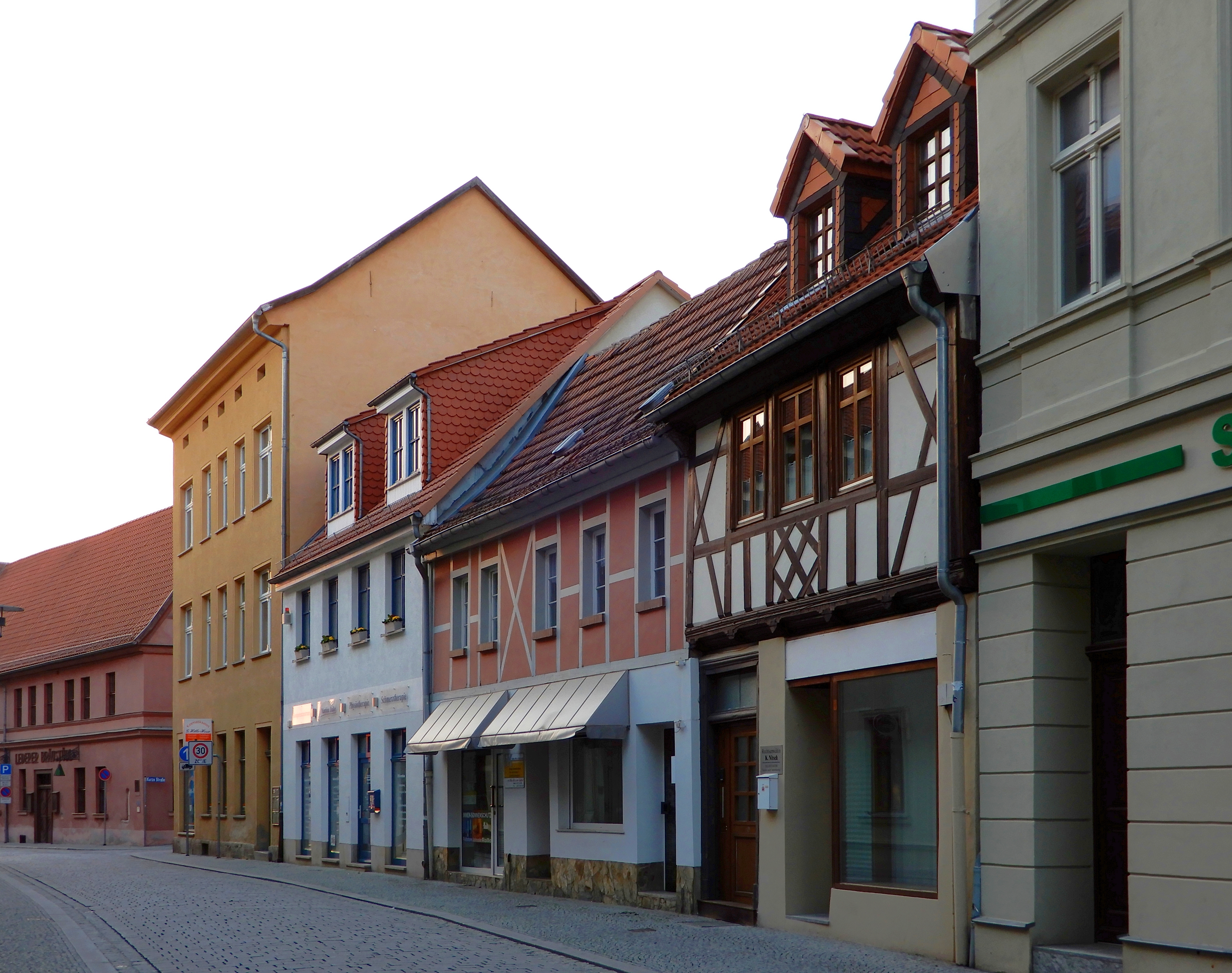 Gebäude Über den Steinen 1-4 in Aschersleben